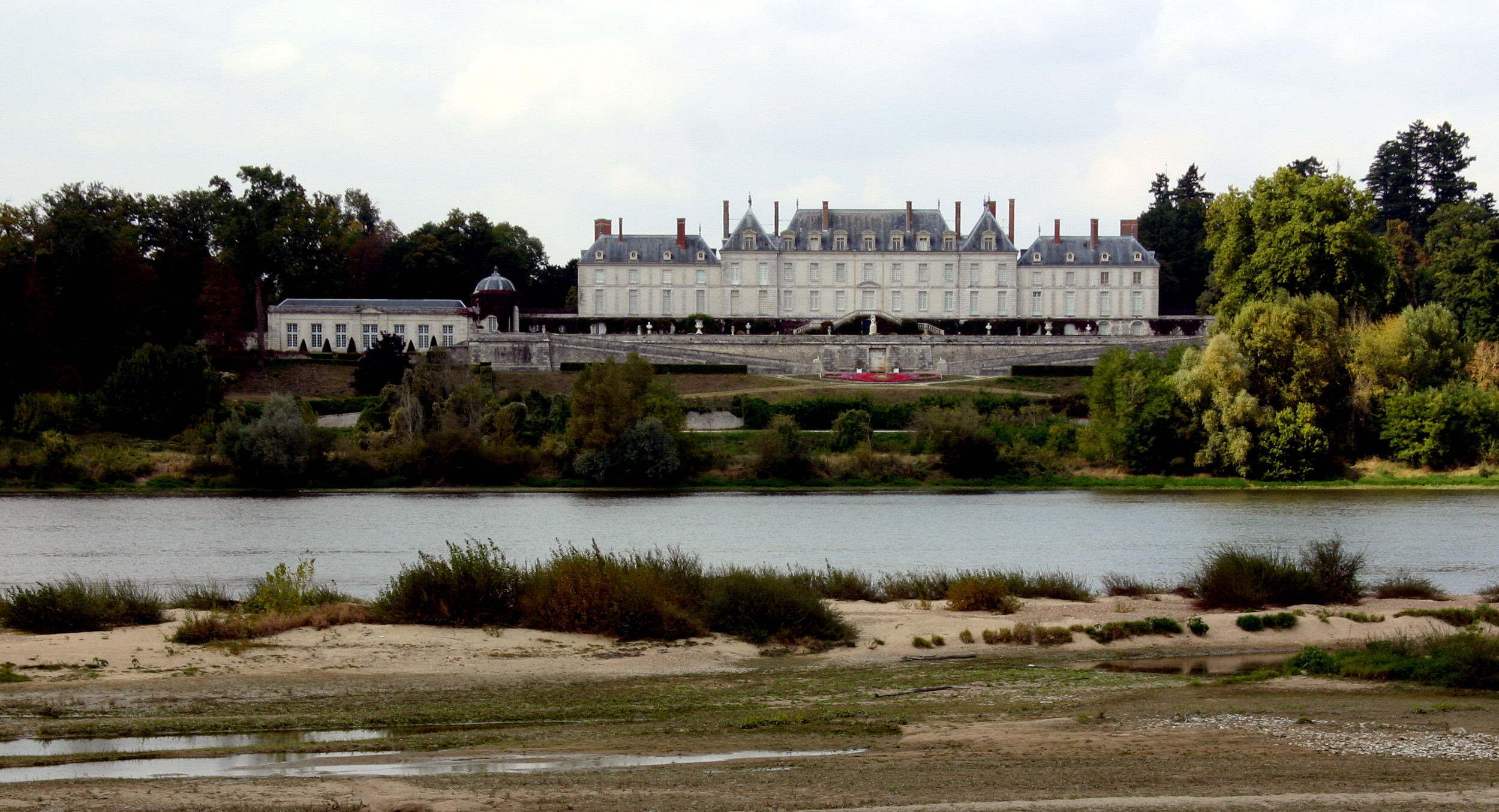 Château de Menars